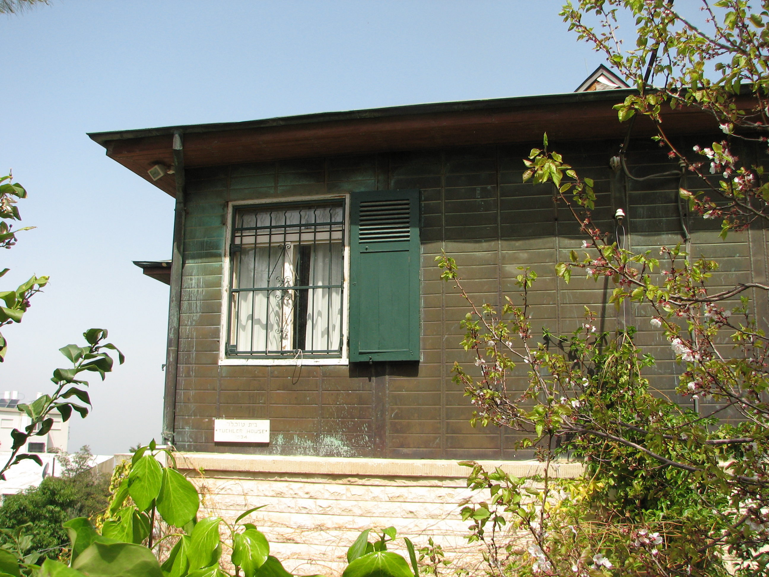 Ahuza, Haifa, Israel שכונת אחוזה, או בשמה המלא אחוזת שמואל, נוסדה בשנות השלושים של המאה העשרים, על הר הכרמל במקום התיישבו בתחילה 22 משפחות. נקראת על שמו של הנציב העליון הרברט סמואל. בית טוכלר, נבנה בשנת 1934 על ידי משפחת טוכלר שהגיעה מגרמניה והביאה איתה בית נחושת